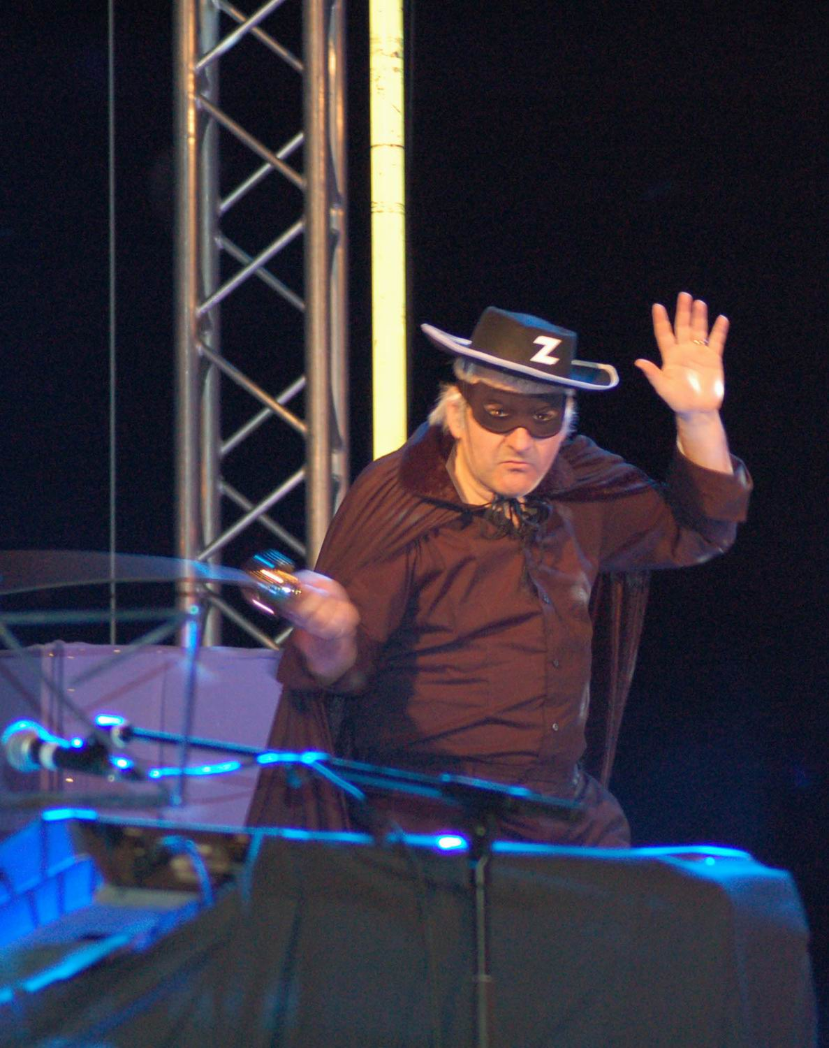 Mangoni EELST live luglio 2007 cesenatico